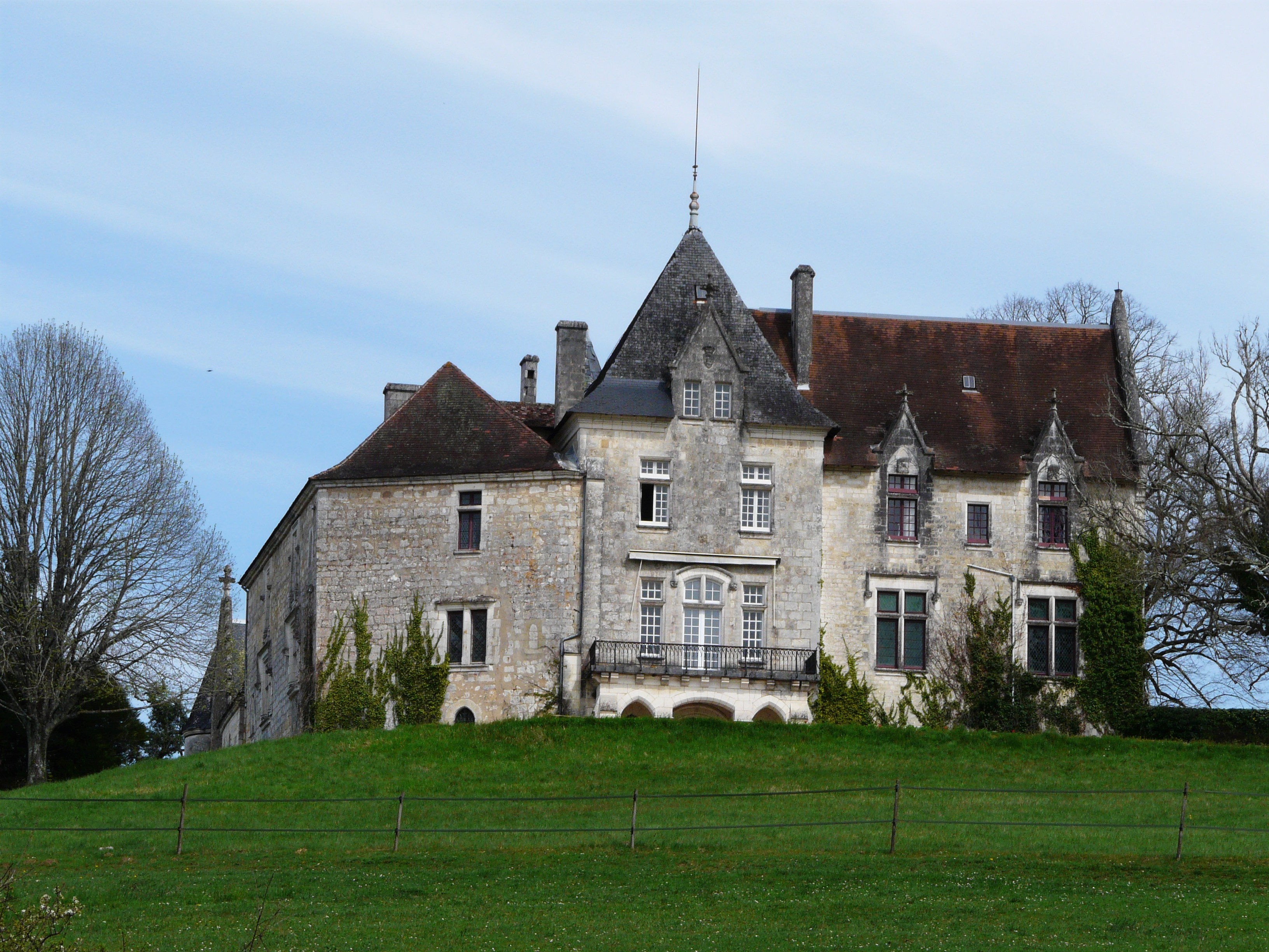 Le château de Bellegarde vu du sud-ouest, Lamonzie-Montastruc, Dordogne, France.